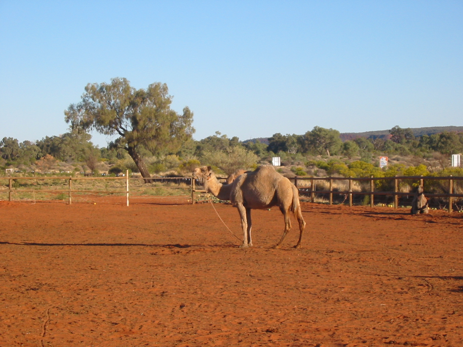 Kamel im Outback